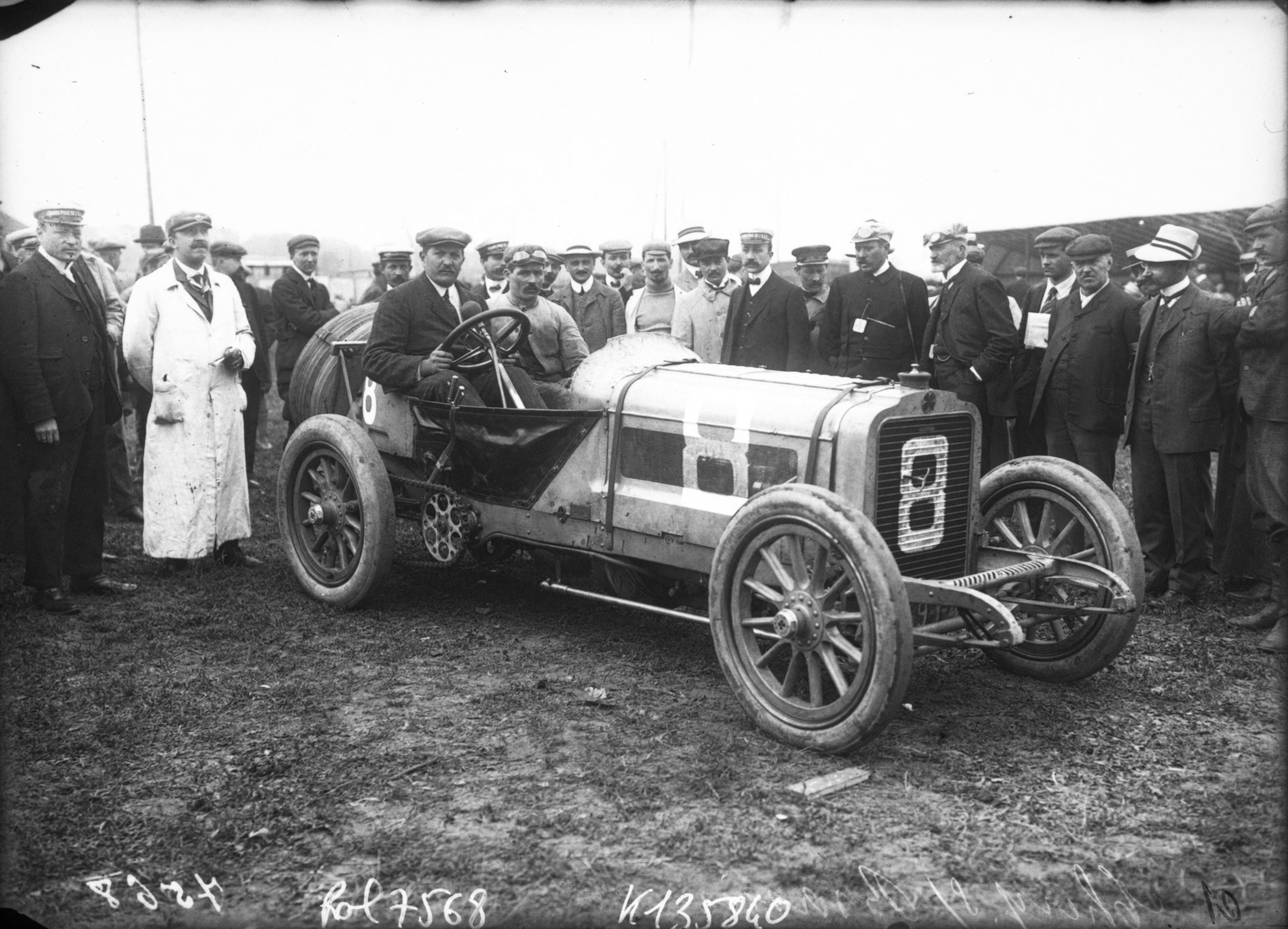 Léon Théry dans sa Brasier au Grand Prix de l'A.C.F. 1908, à Dieppe